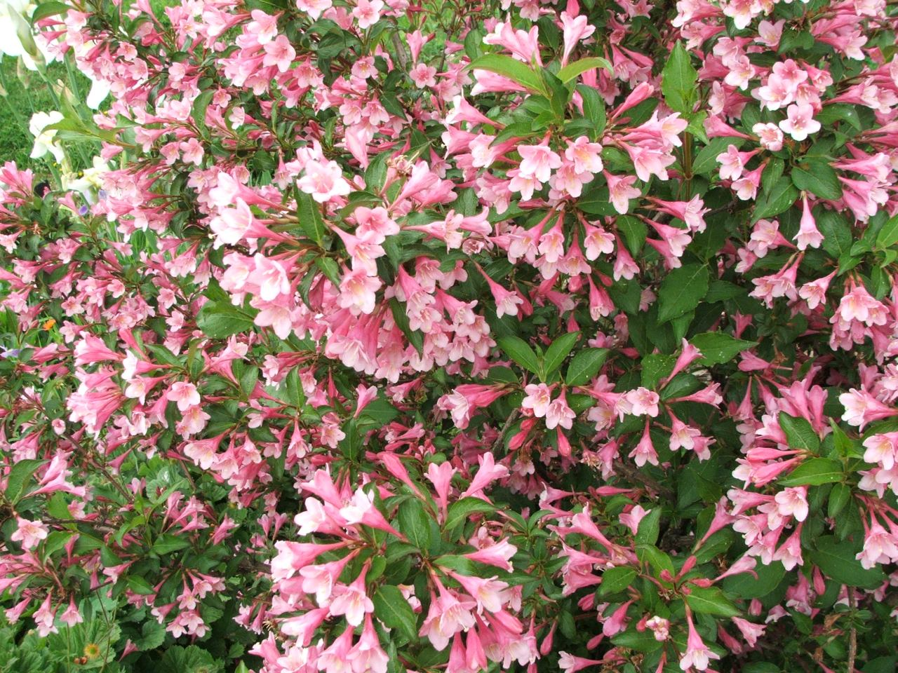 Weigela florida (pl. krzewuszka cudowna)